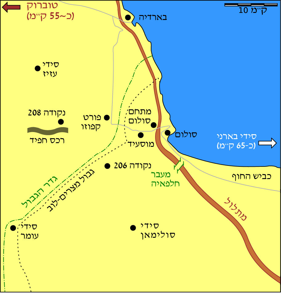 אזור גבול מצרים-לוב ערב מבצע צלבן.